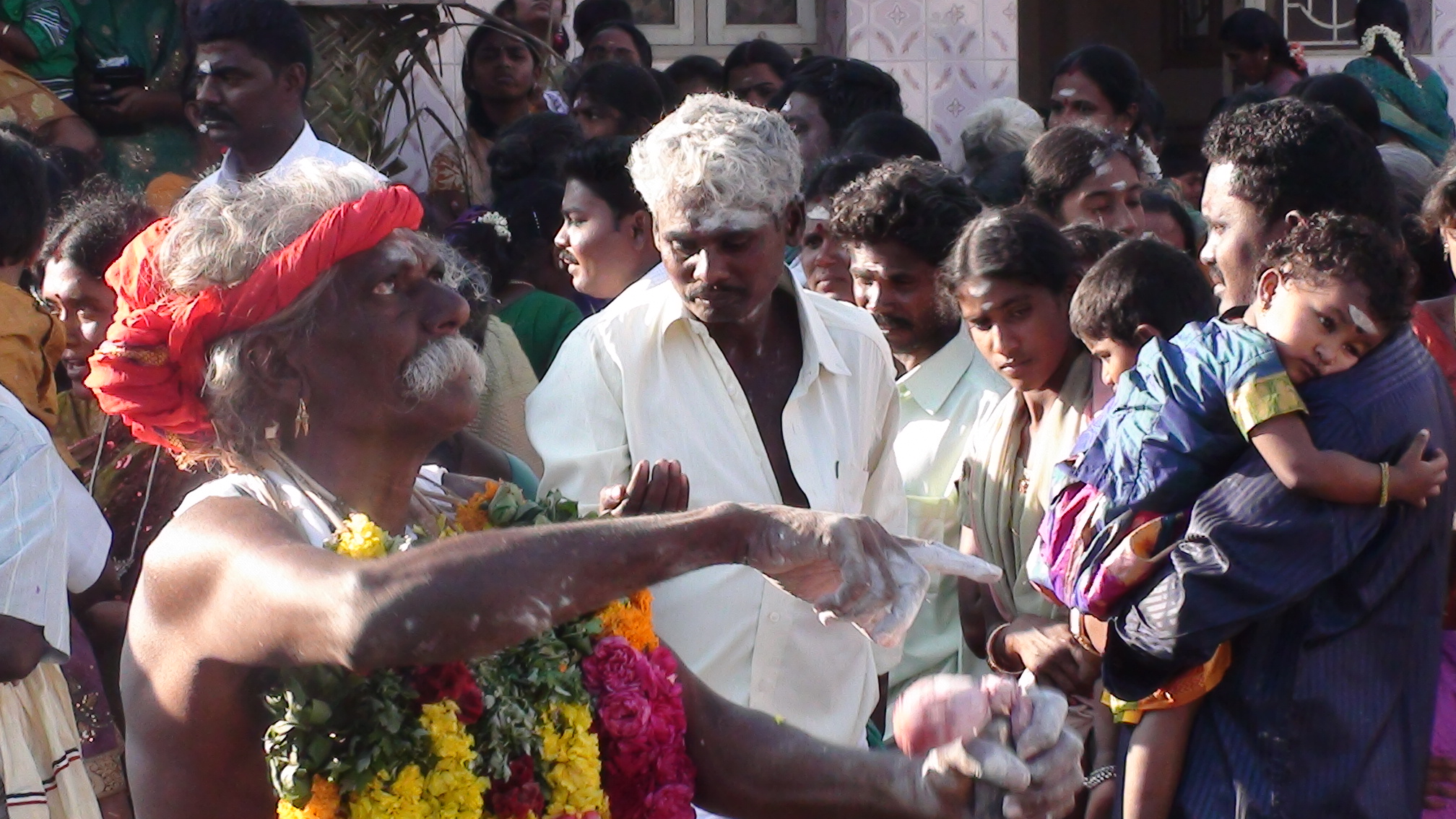 அருள் ஏறப்பெற்ற நிலையில் சாமியாடி